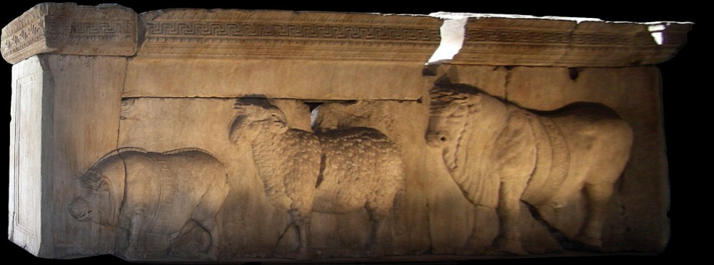 Fragment des Plutei Traiani : face arrière d'un des fagment, présentant la procession des victimes d'un sacrifice (suovetaurilia).